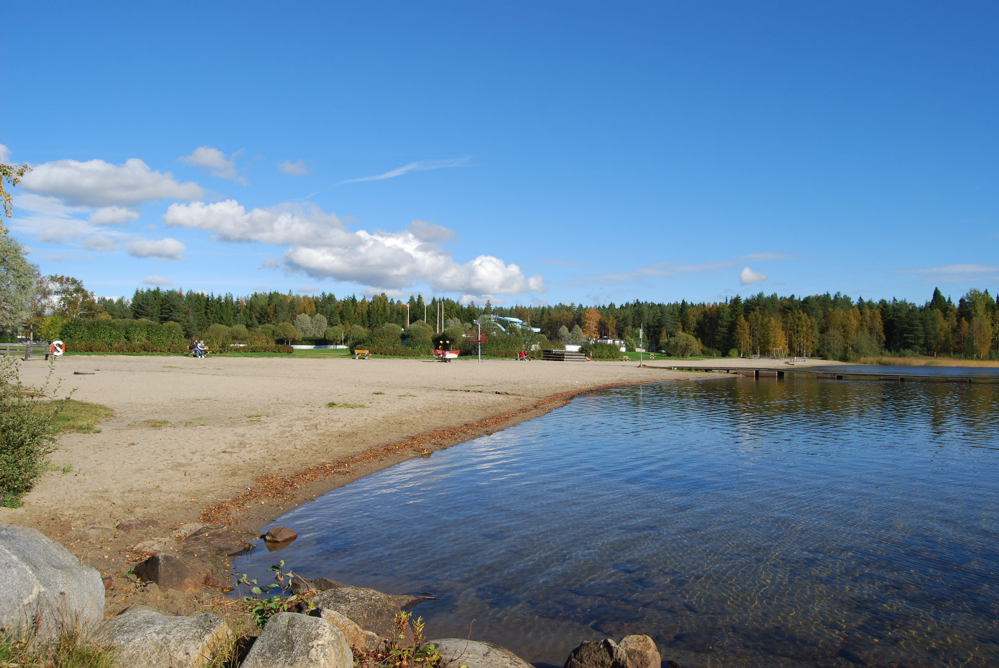 Nydalabadet i Nydalasjön, Umeå